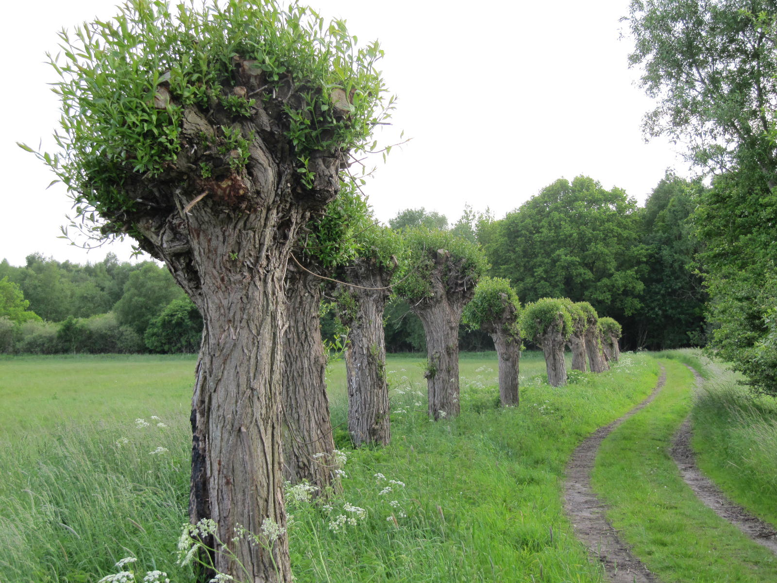 Kleine Allee (Kopfweiden) am Dosenmoorrand, Schleswig-Holstein (Nähe Neumünster)